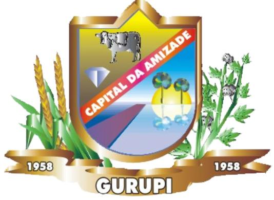 Brasão do município de Gurupi